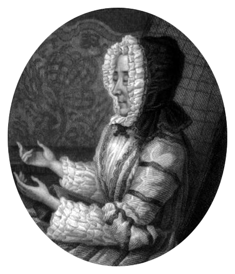 Portrait of Marie du Deffand (1697-1780)